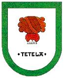 Escudo Tetela de Ocampo